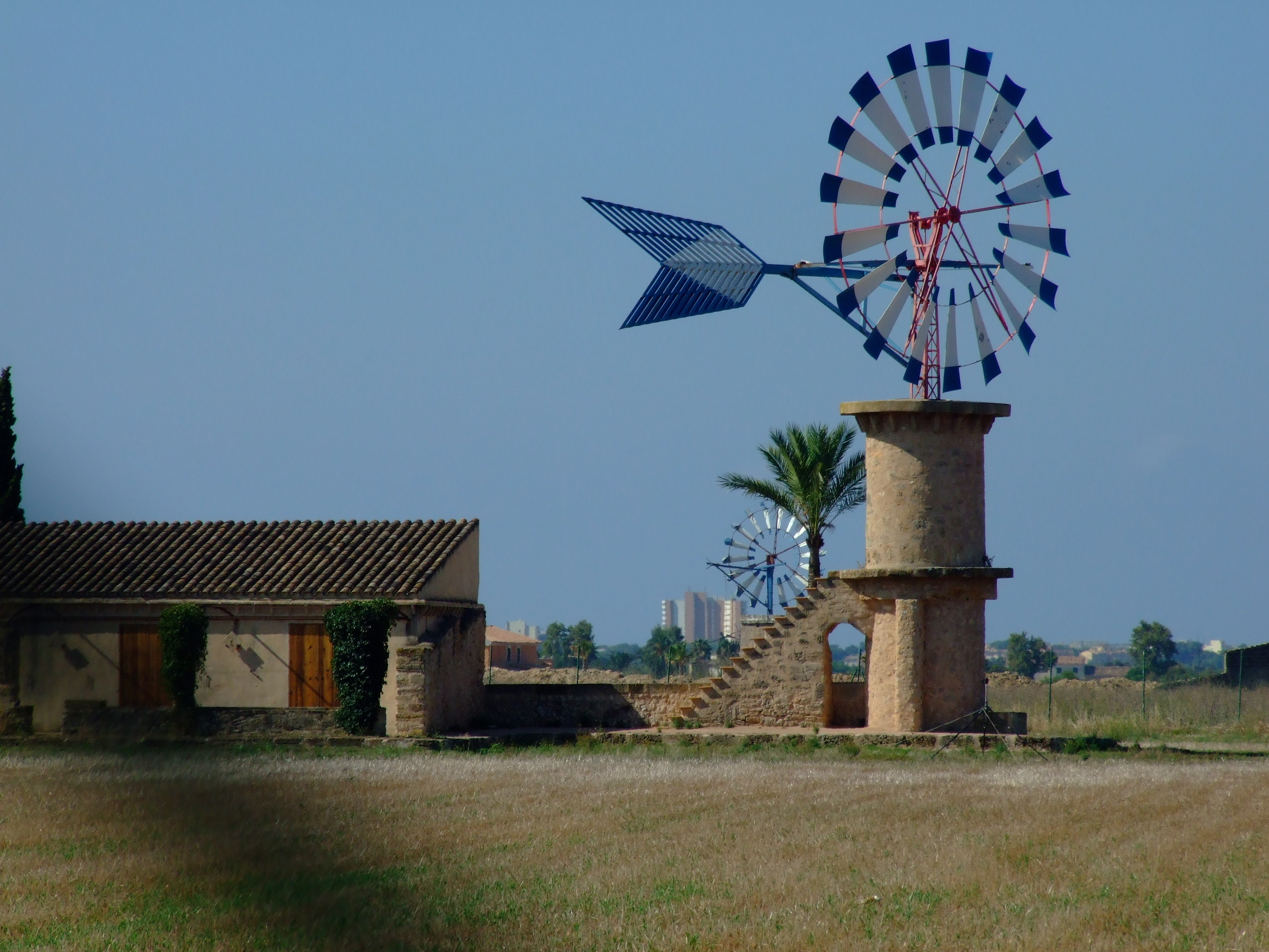 Windmühle Nähe Airport Palma de Mallorca